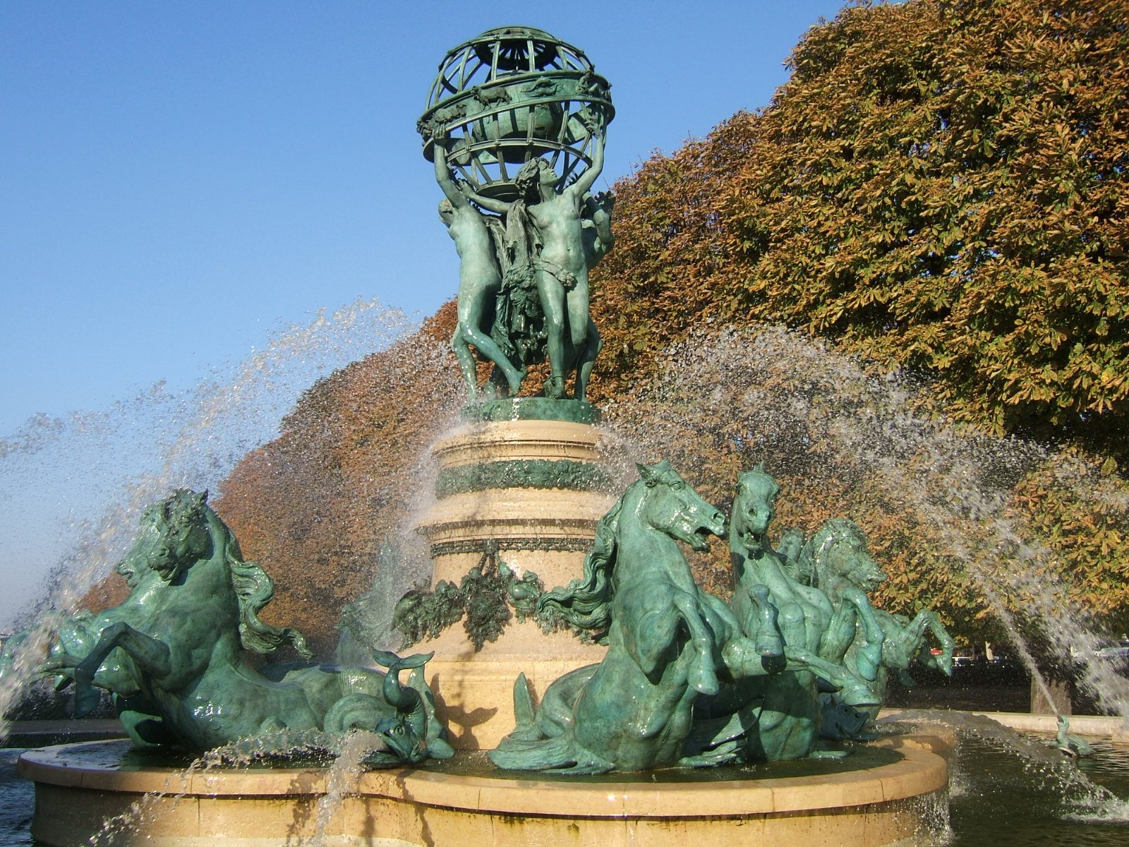 Fontaine des Quatre-Parties-du-Monde (Paris, France)